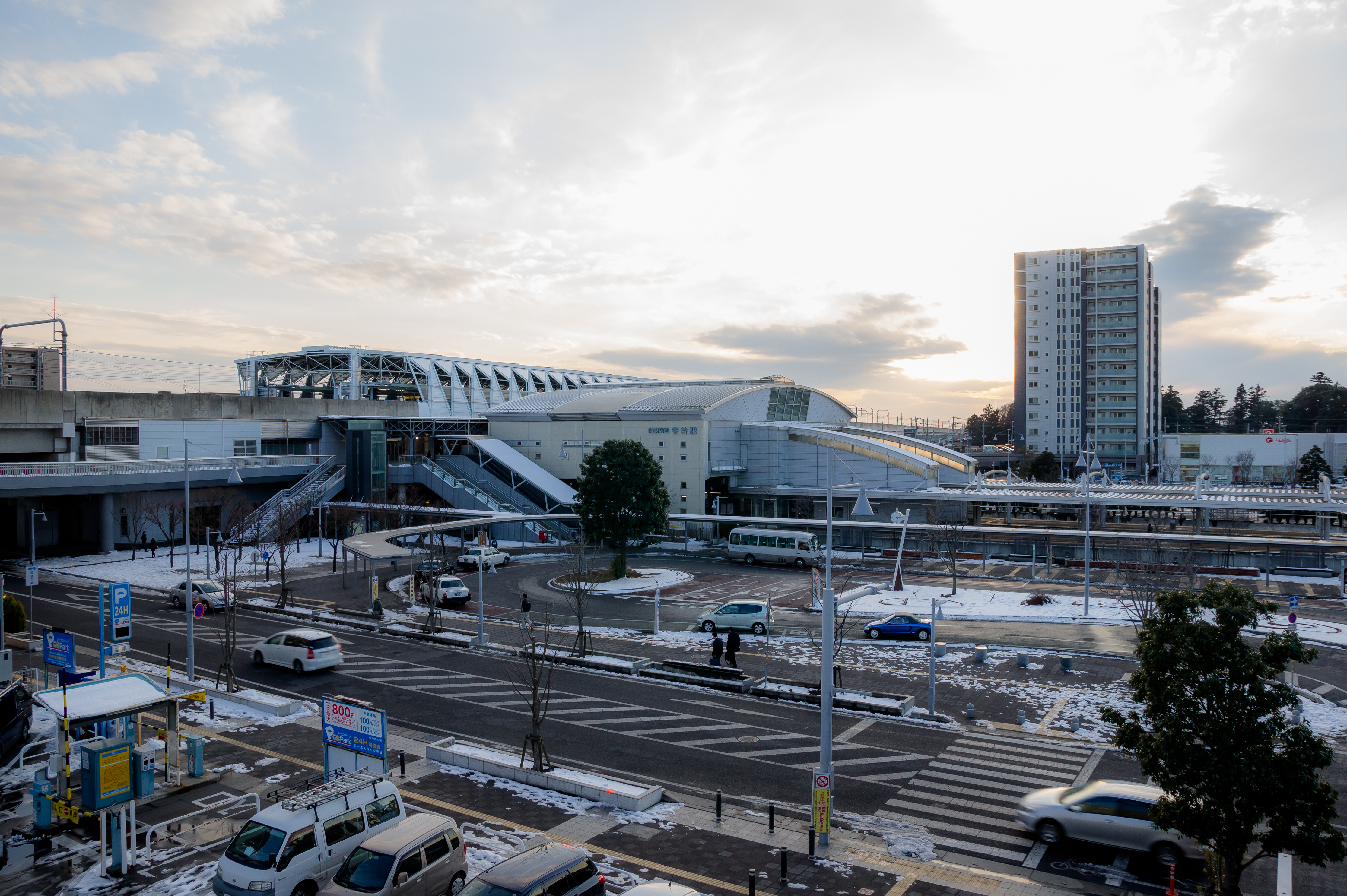 守谷駅中央東口